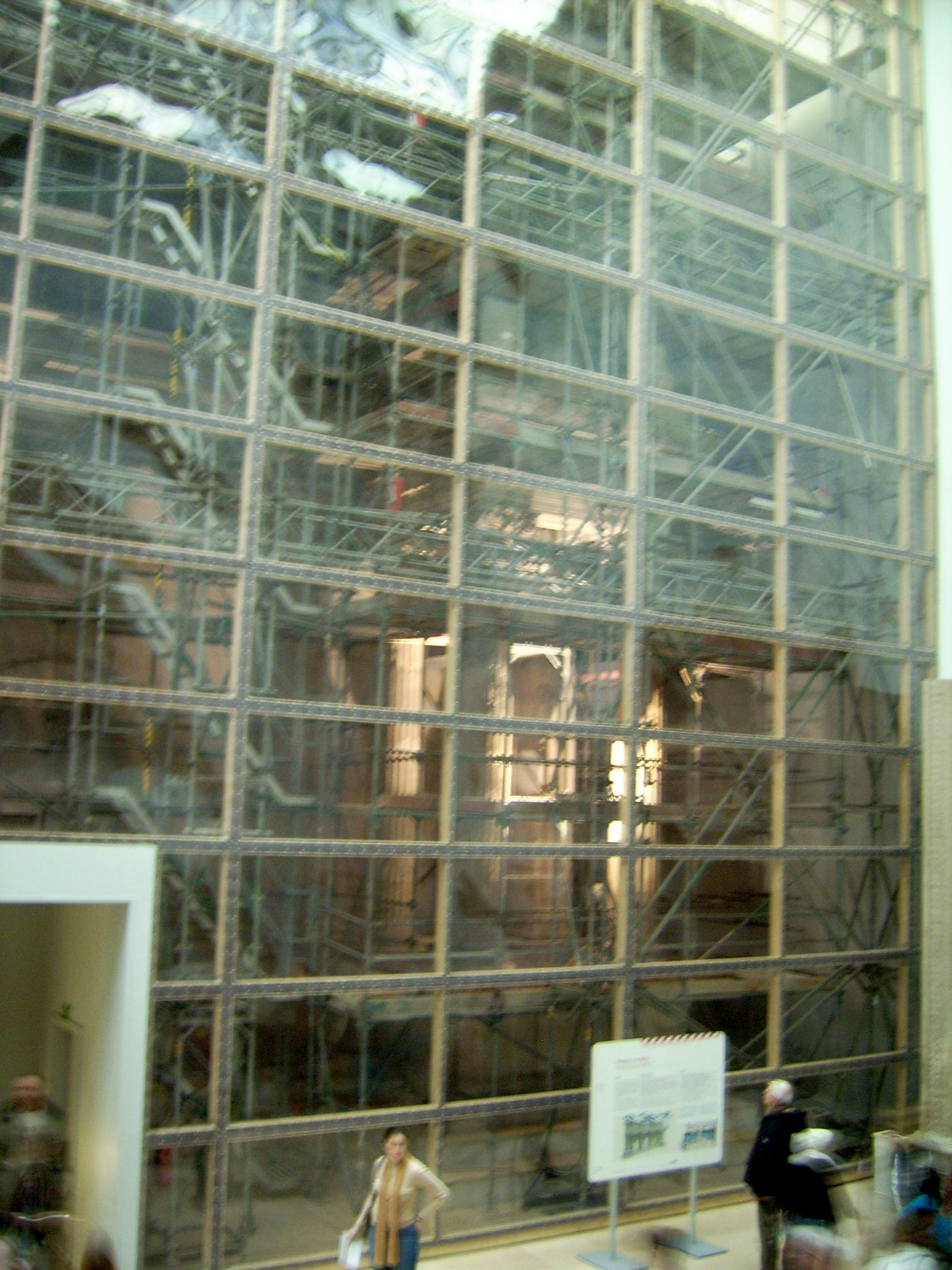 Markttor von Milet während der Restaurierung, Januar 2007